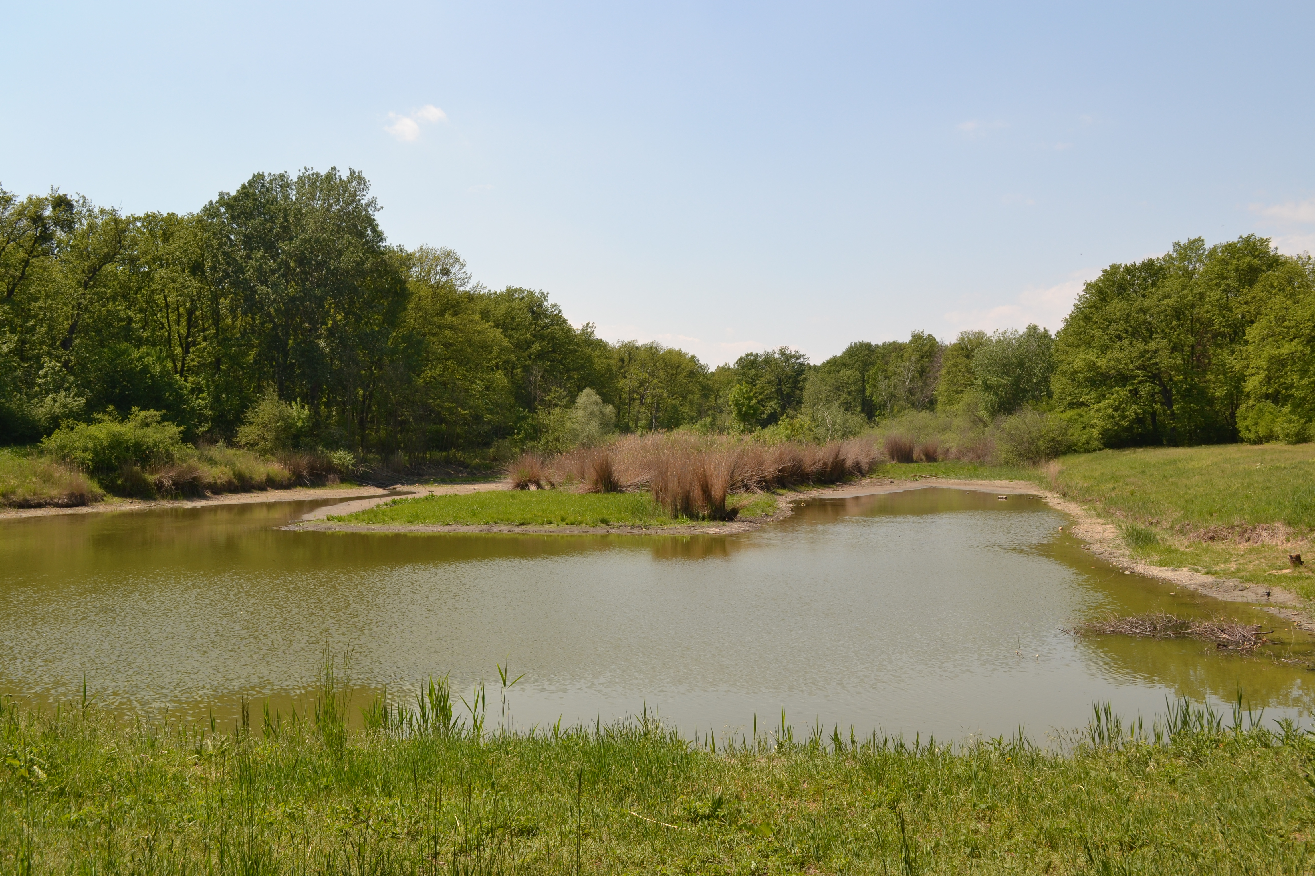 Valtice - PP Rendez-Vous.